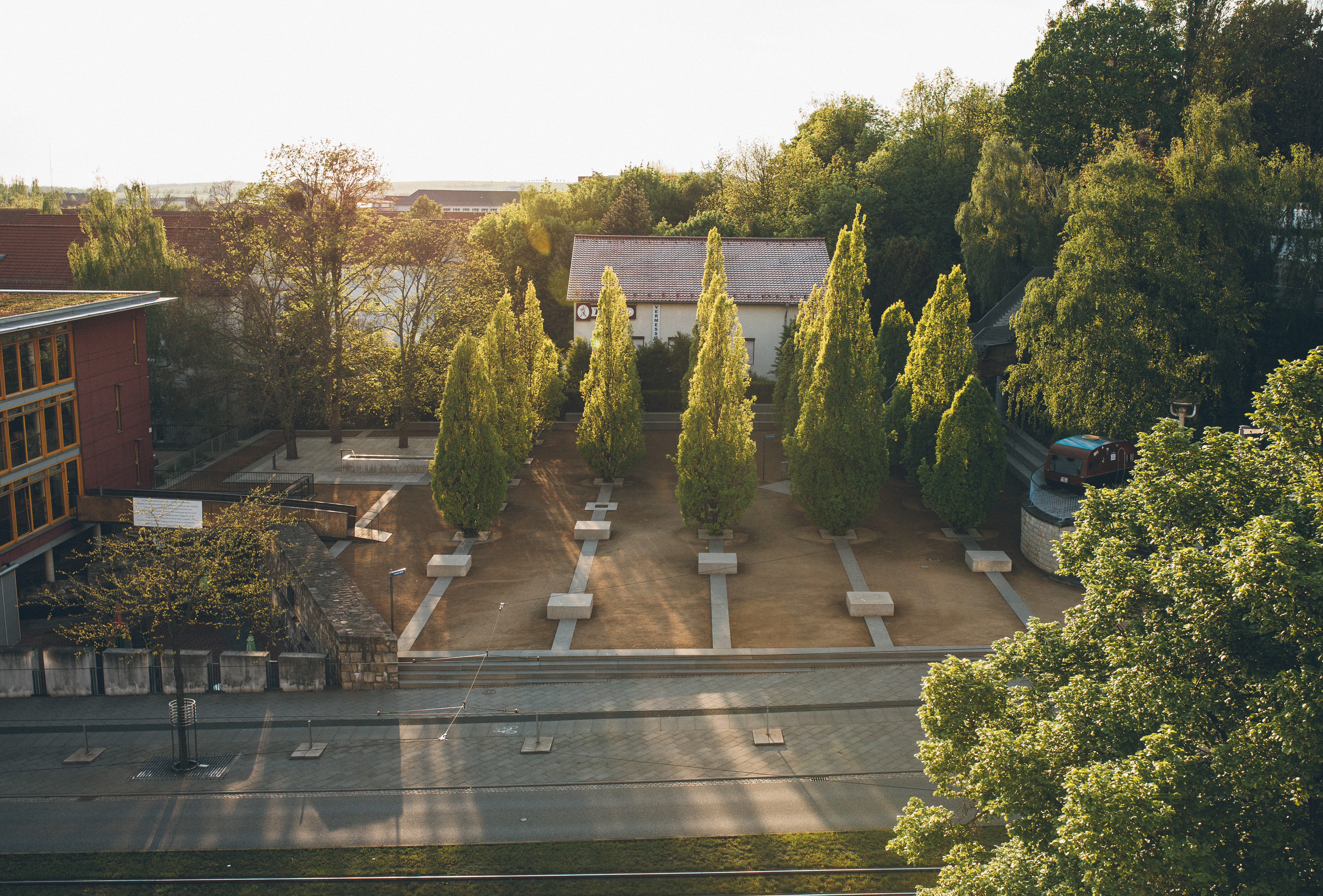 Der Lesserplatz in Nordhausen. Die Namensverleihung kam im Mai 2017 im Zuge des 25. Jubiläums der Nordhäuser „Friedrich-Christian-Lesser-Stiftung“ und des 325. Geburtstages von Friedrich Christian Lesser. Er arbeitete u. a. als Pfarrer in Nordhausen an der Nikolai- und Frauenbergkirche und als Chronist. Der Lesserplatz ist einstiger Standort der St. Jacobikirche.